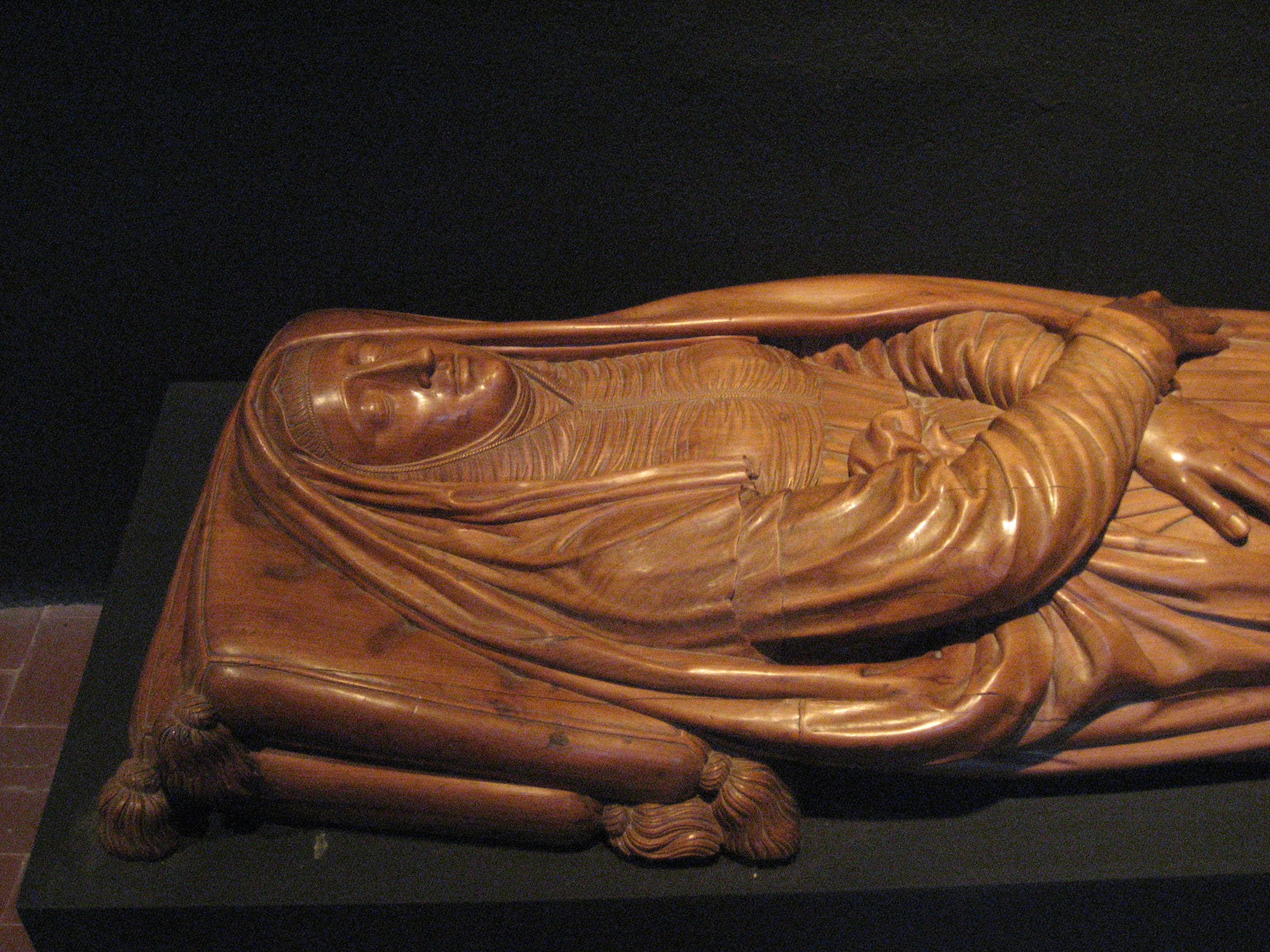 Detalle de La Dormición de Jeroni Xanxo, en el Museo Diocesano de Urgel (Cataluña) (España)